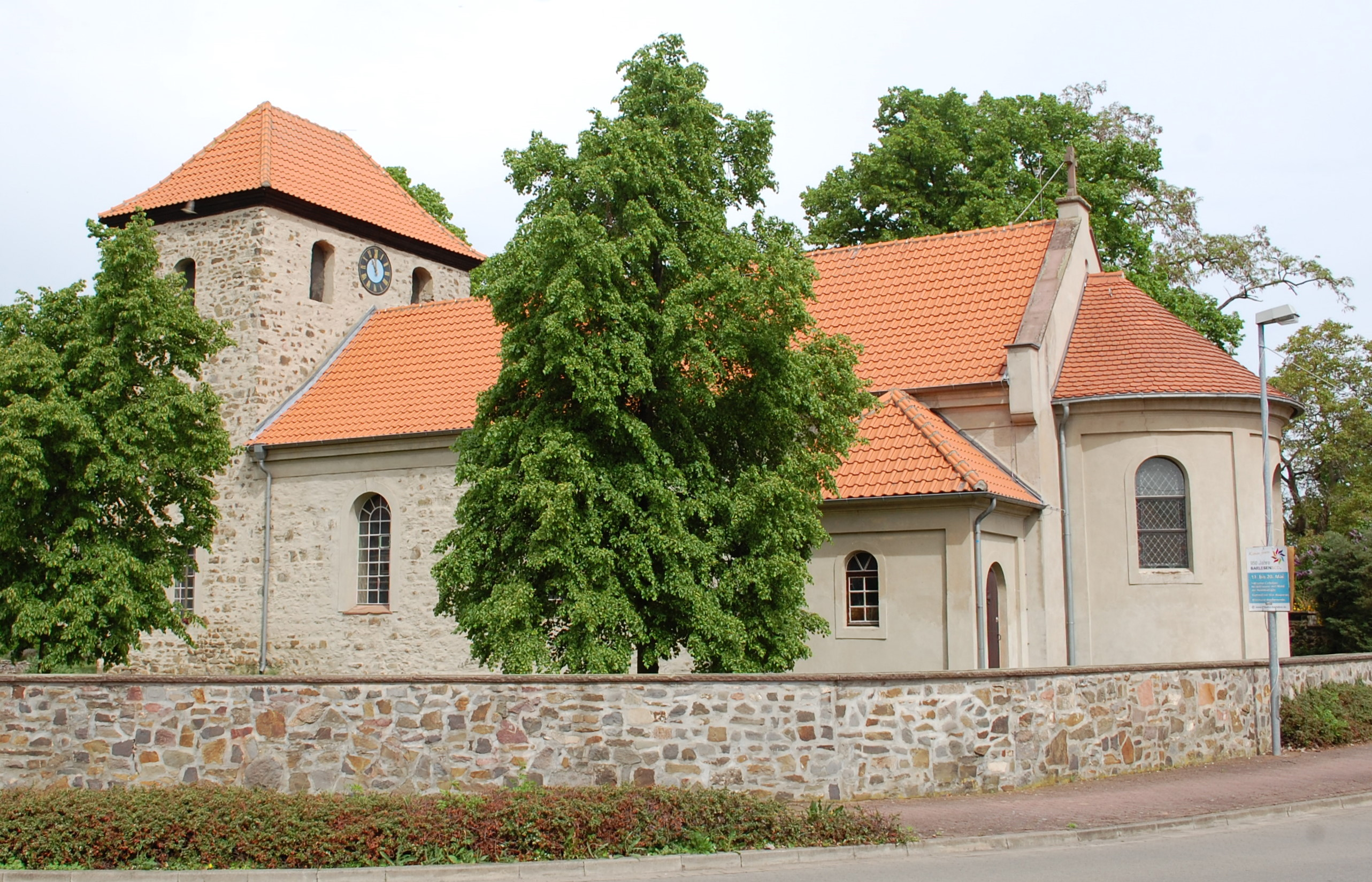 Südseite der Dorfkirche Vahldorf